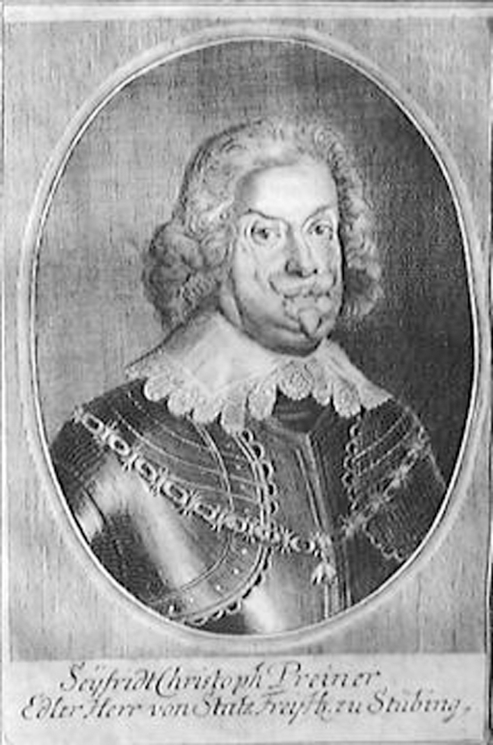 Seyfried Christoph Graf Breuner